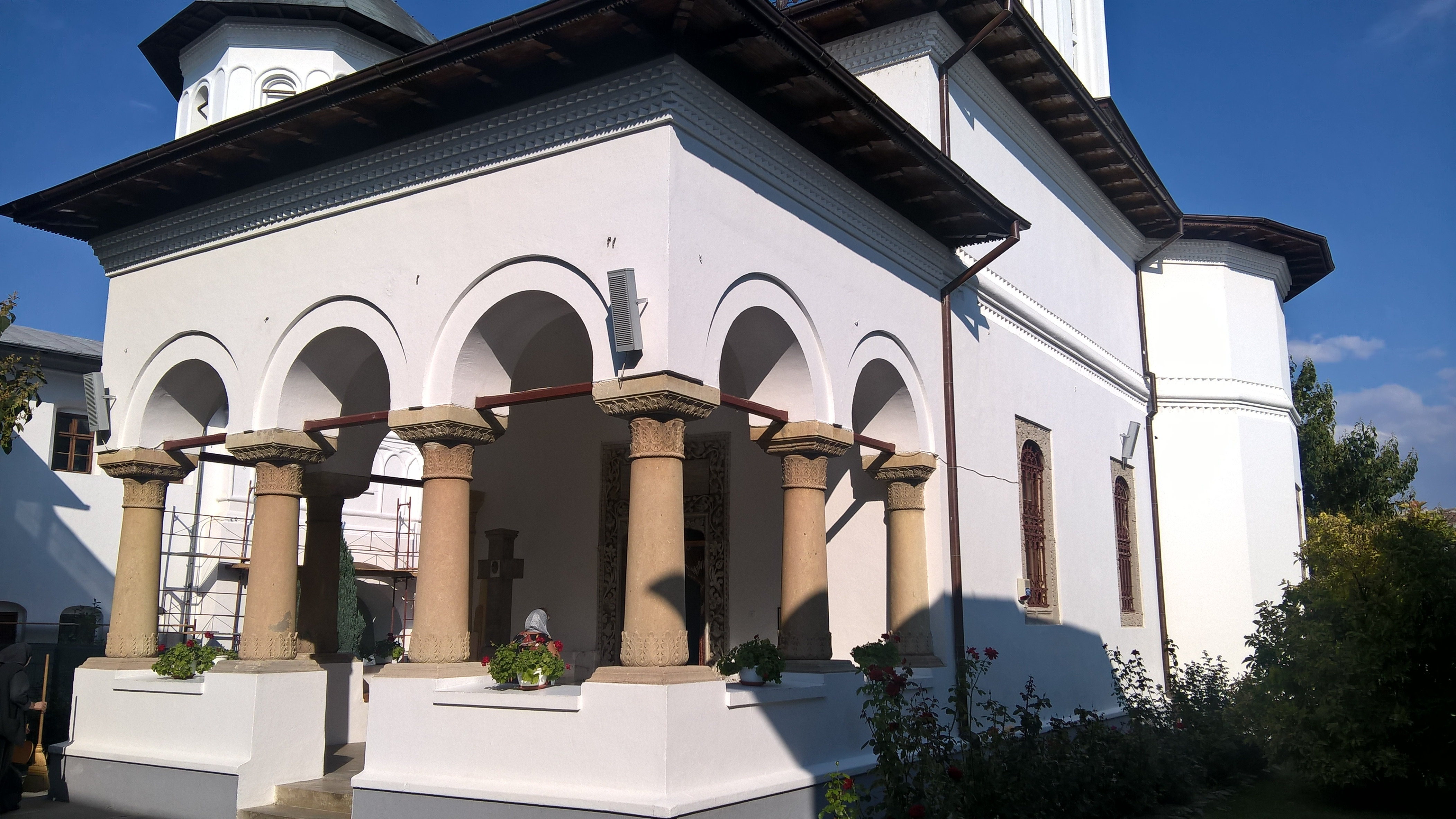 Biserica „Adormirea Maicii Domnului” 01